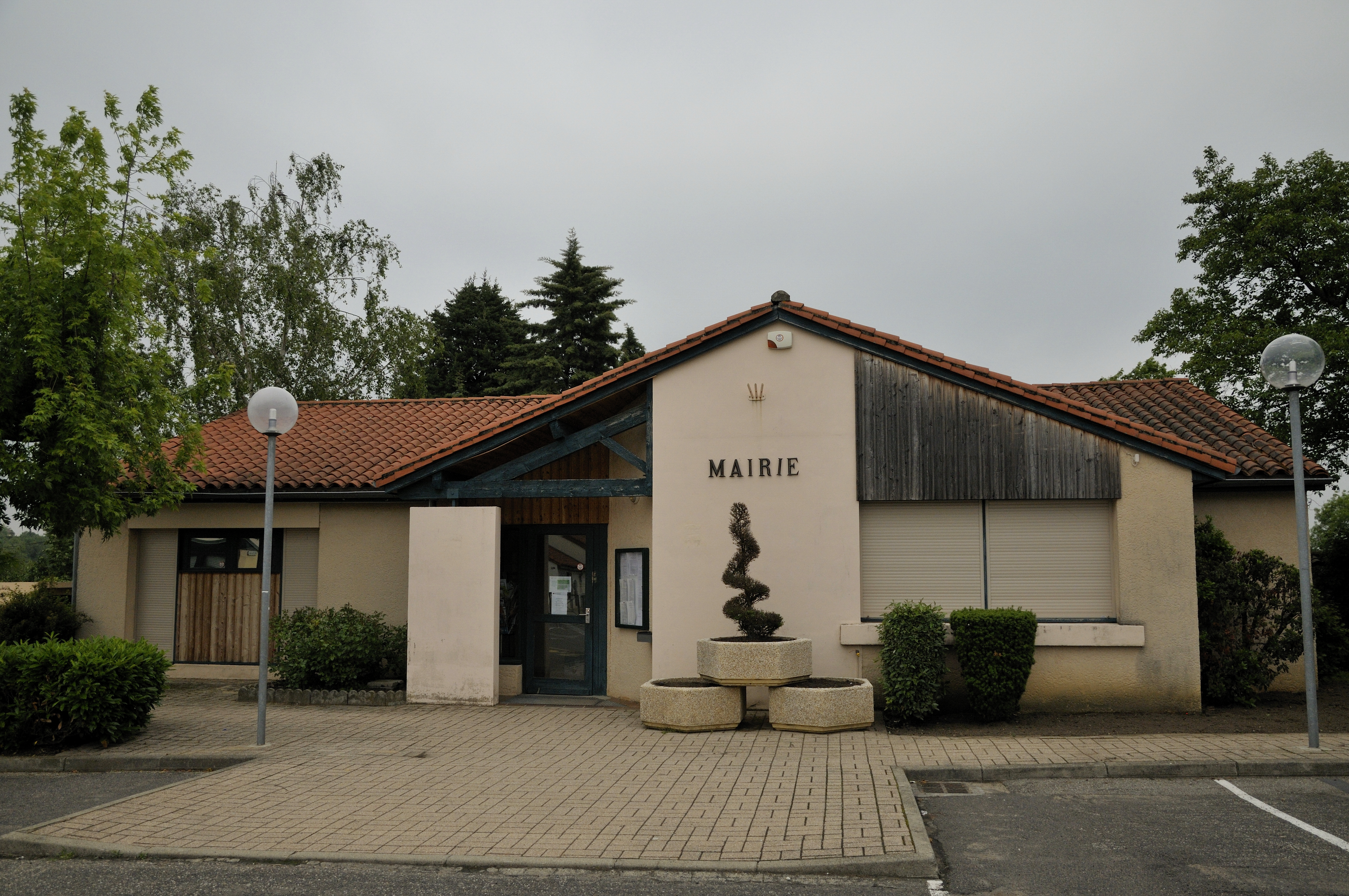 la mairie